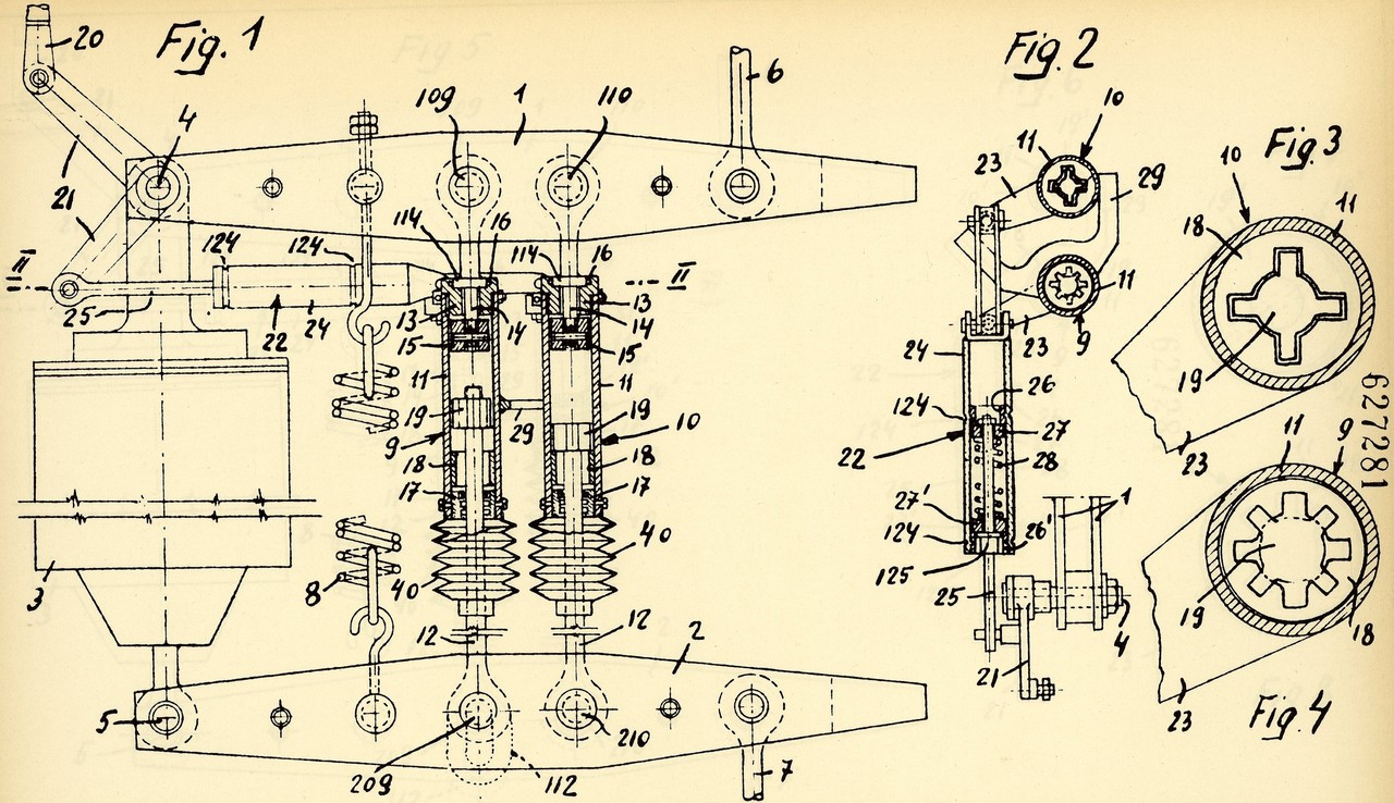 Brevetto per invenzione industriale n. 627281 di Aldo Galante. Due figure raffiguranti il dispositivo variatore del rapporto di trasmissione fra il cilindro di comando e la timoneria del freno nei veicoli ferroviari (AS Genova, Ufficio provinciale per l'industria, il commercio e l'artigianato di Genova, Brevetti, classe B 61, 1960)